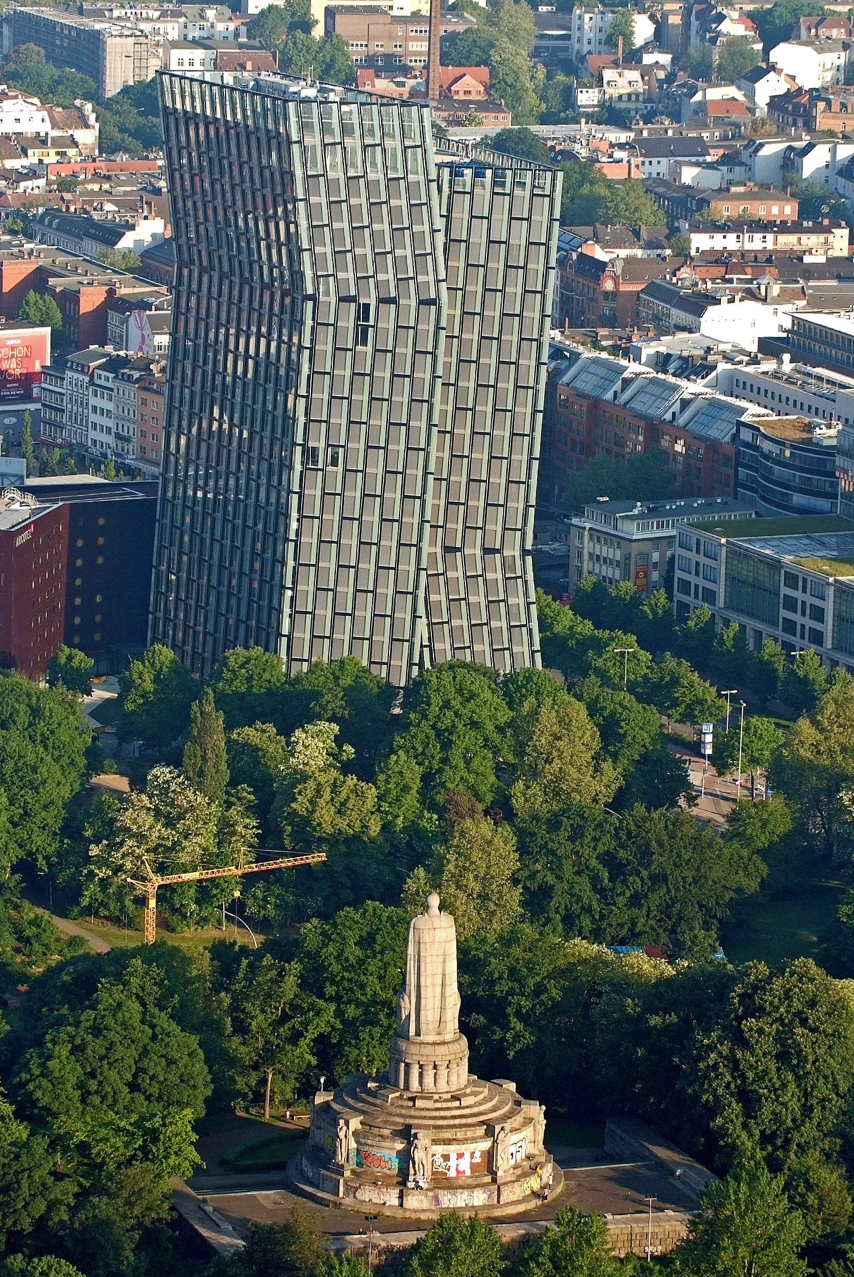 Projekt Heißluftballon Bismarck-Denkmal (vorne) und Tanzende Türme